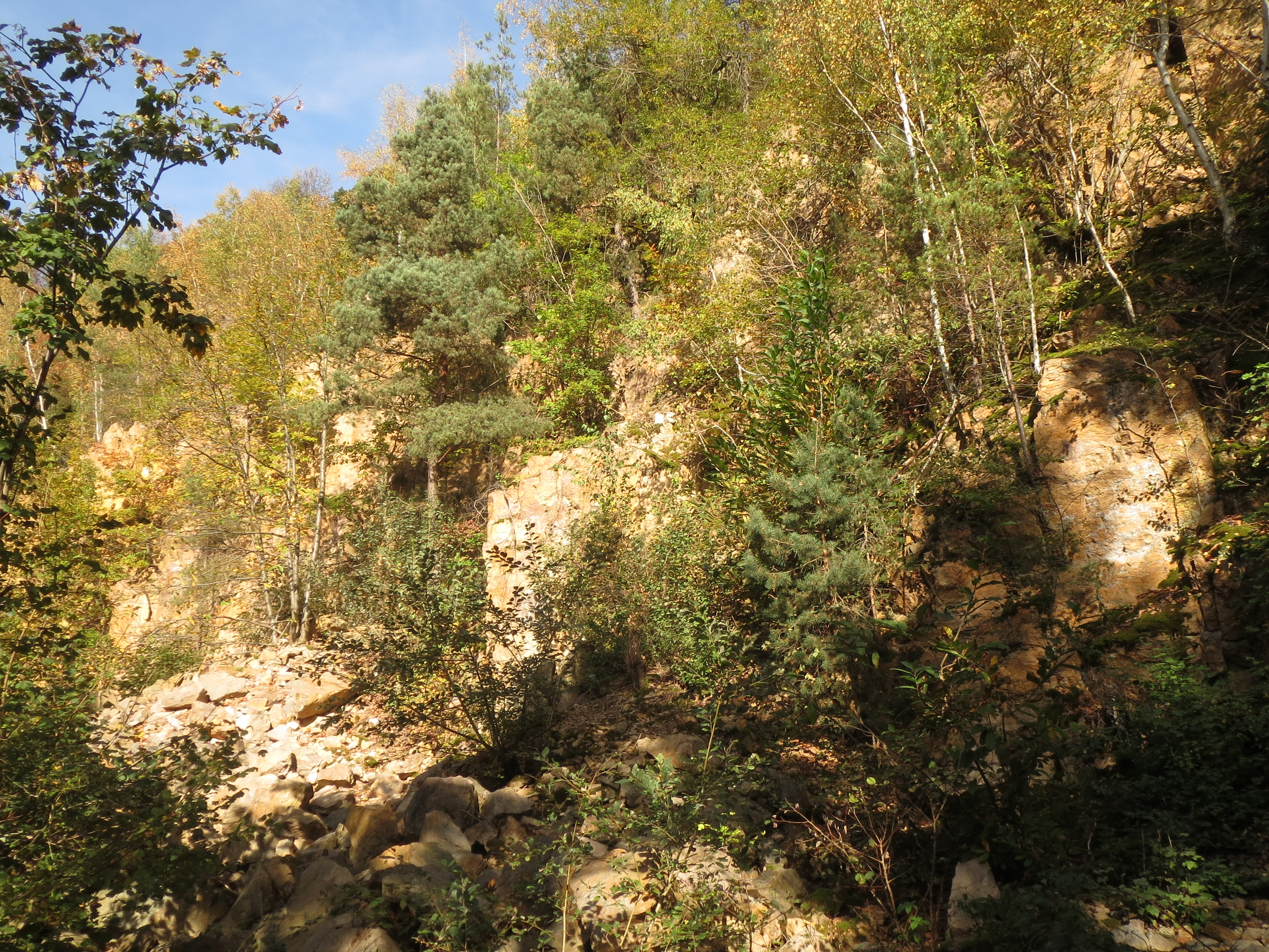 Die unterste stark zugewachsene Ebene des Steinbruchs